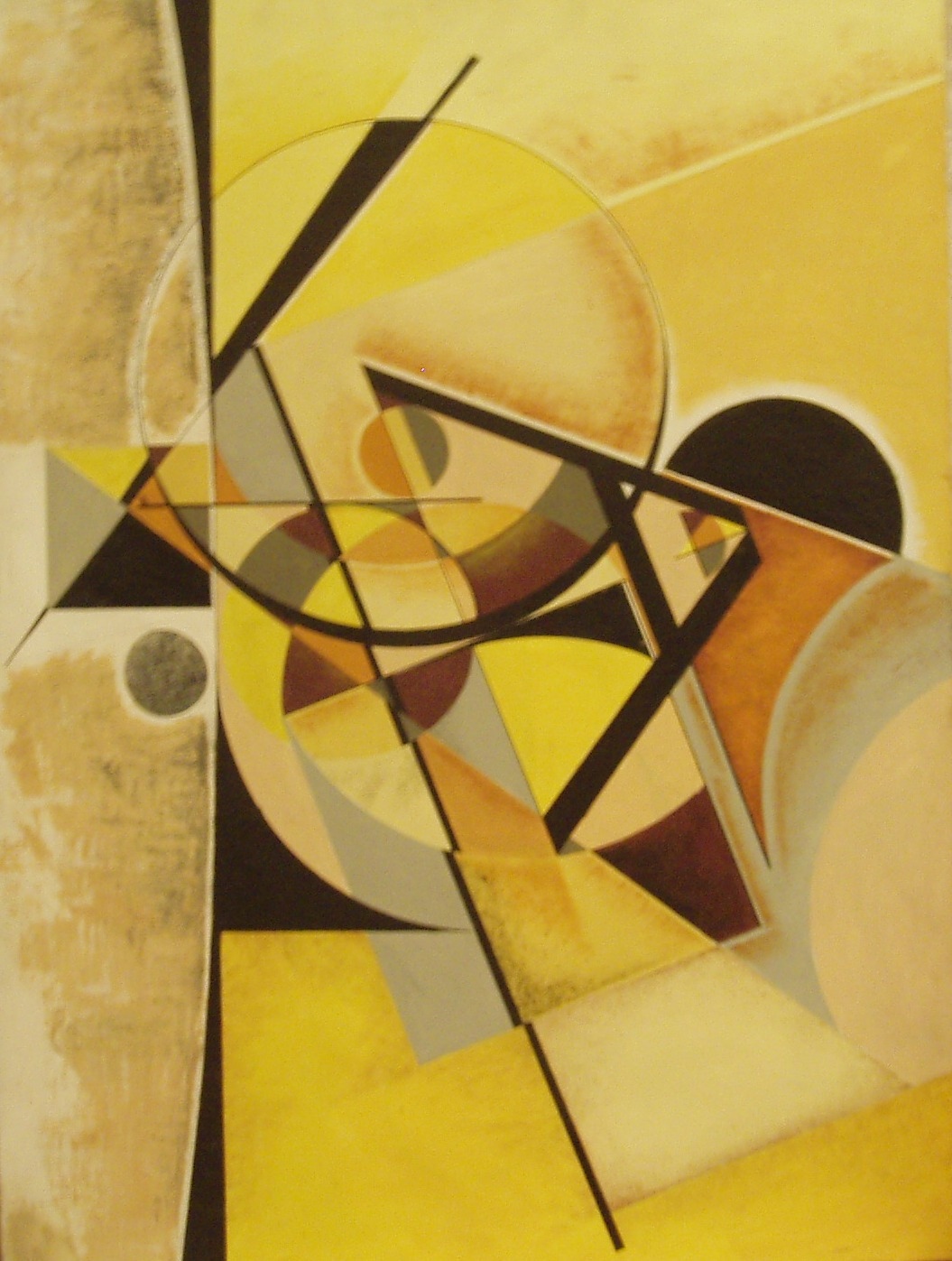 Óleo sobre tela. 81x100. Barcelona, España. 1973